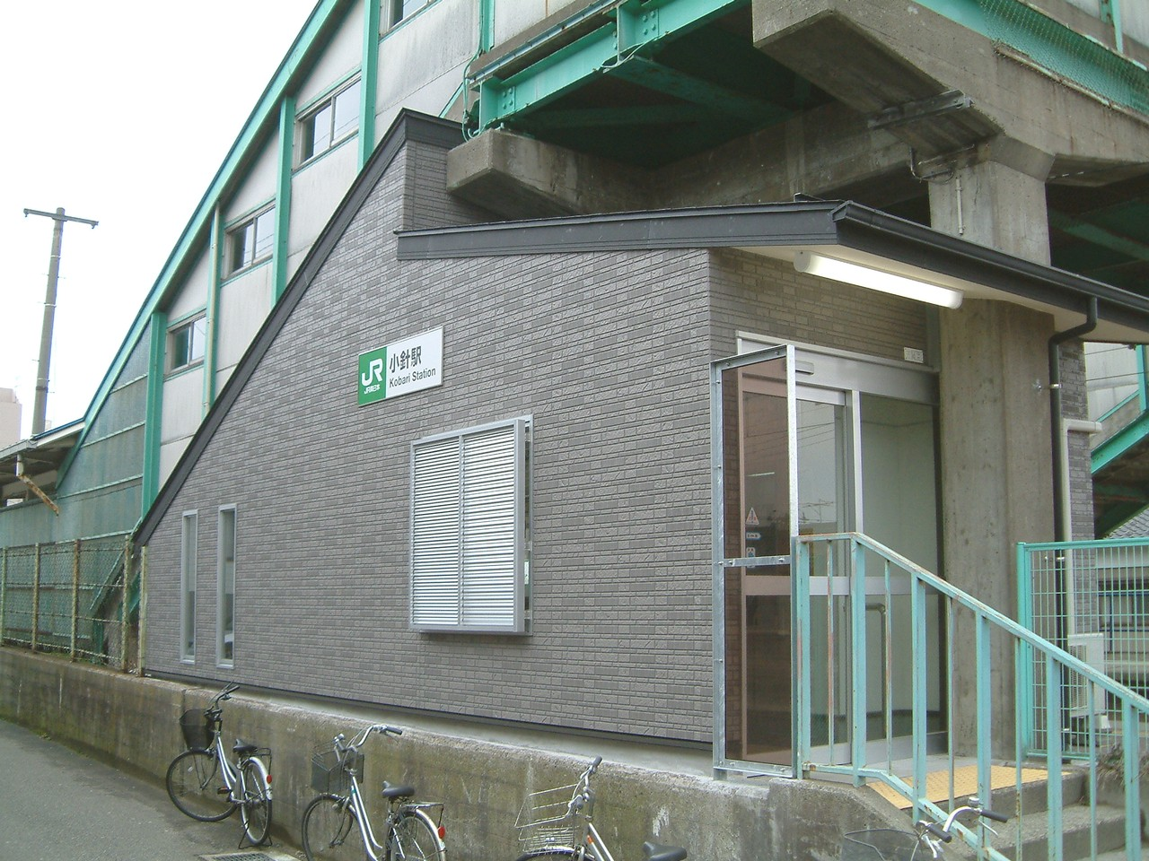 JR小針駅